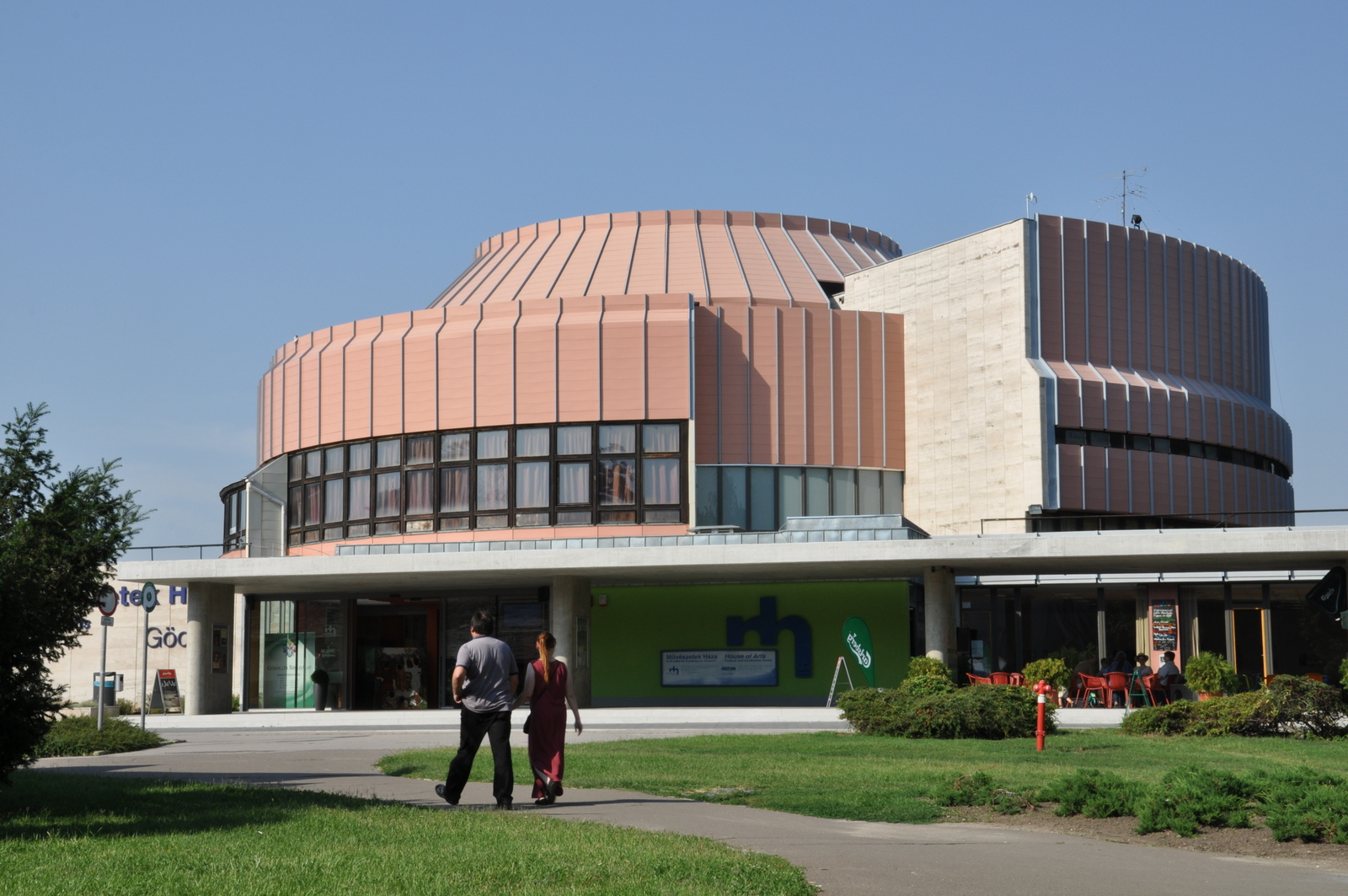 House of Arts, Gödöllő, Hungary